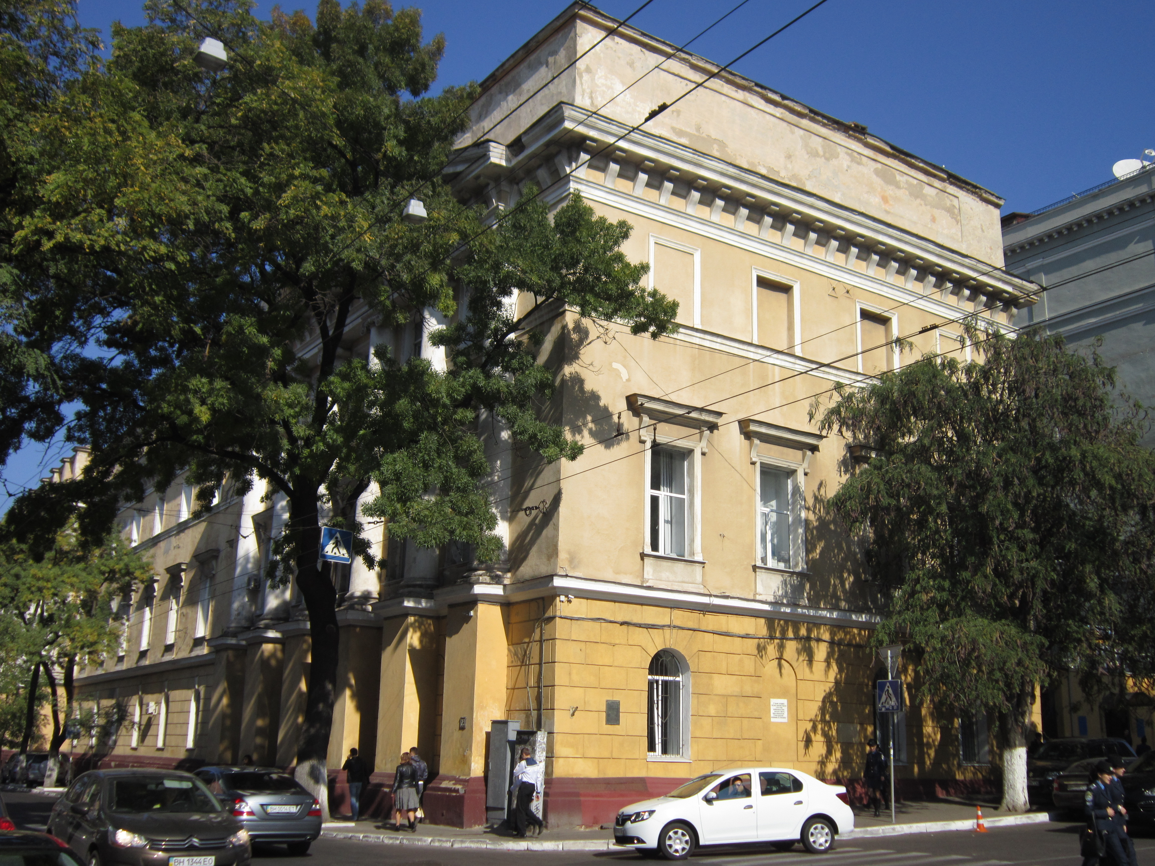 Будинок Сабанських казарм, де під час оборони м. Одеси у 1941 р. було сформовано полк морської піхоти під командуванням Осипова Я. І., Одеса, вул. Канатна, 23